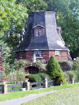 Kleev bi Hennsteed,, Düütschland: De Reimersche Möhl (1816-1952), hüüttodaags Privatwahnung